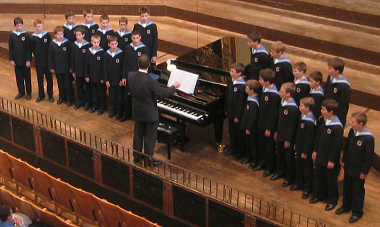 Wien, Austria: Wiener Sängerknaben (Vienna Boys' Chorus) during a concert at the Wiener Musikverein